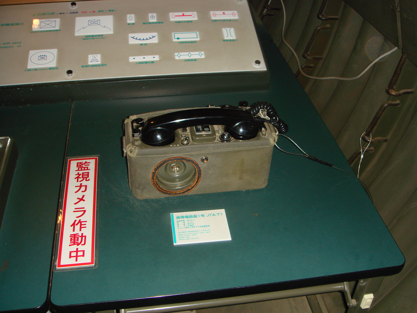 陸上自衛隊 70式携帯電話機1号 JTA-T1。 2008年4月13日 陸上自衛隊広報センターにて。